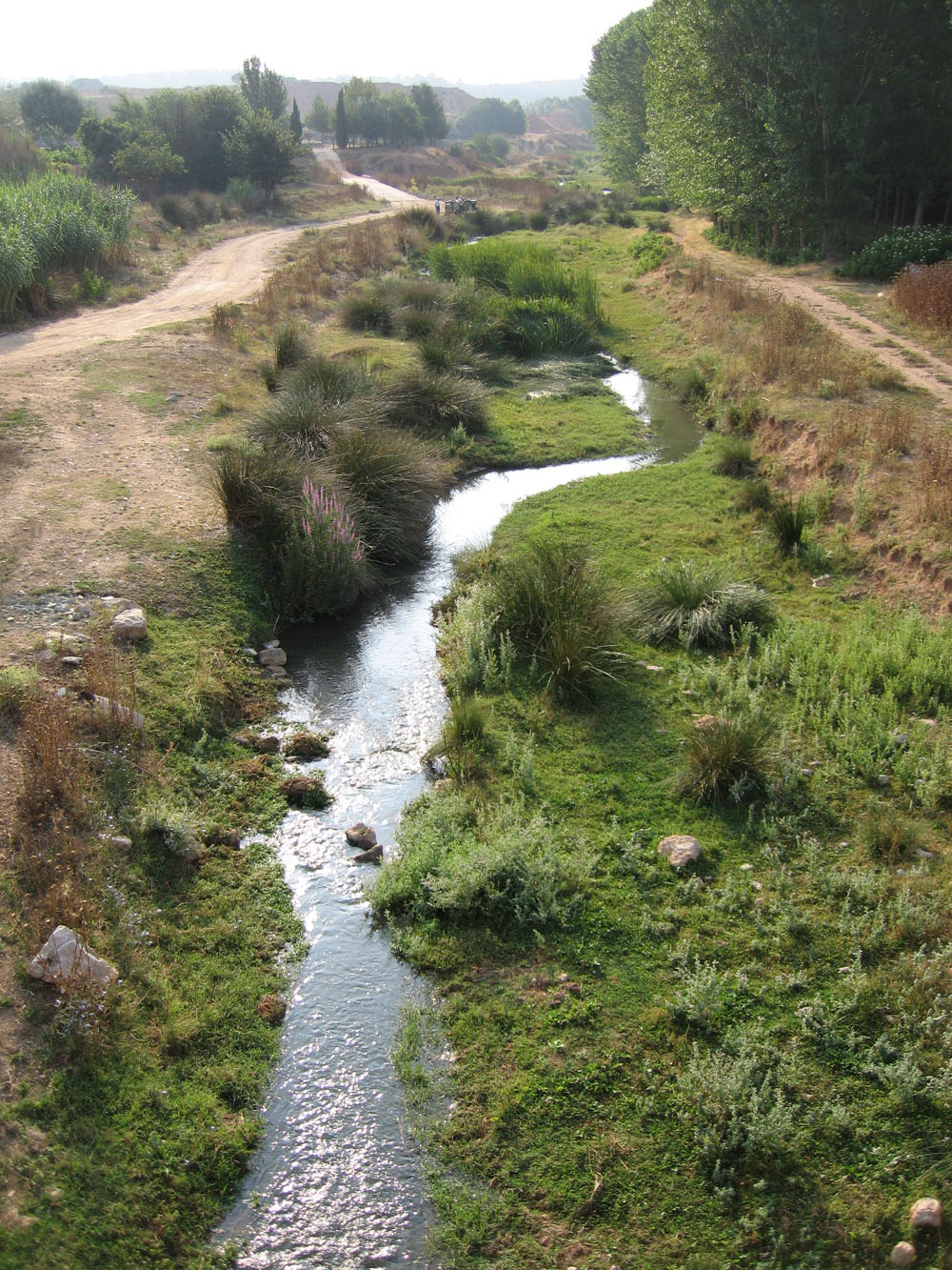 Vista del río Magro por su paso junto a Requena, en la provincia de Valencia. La foto esta tomada desde el puente que cruza la CV-431.